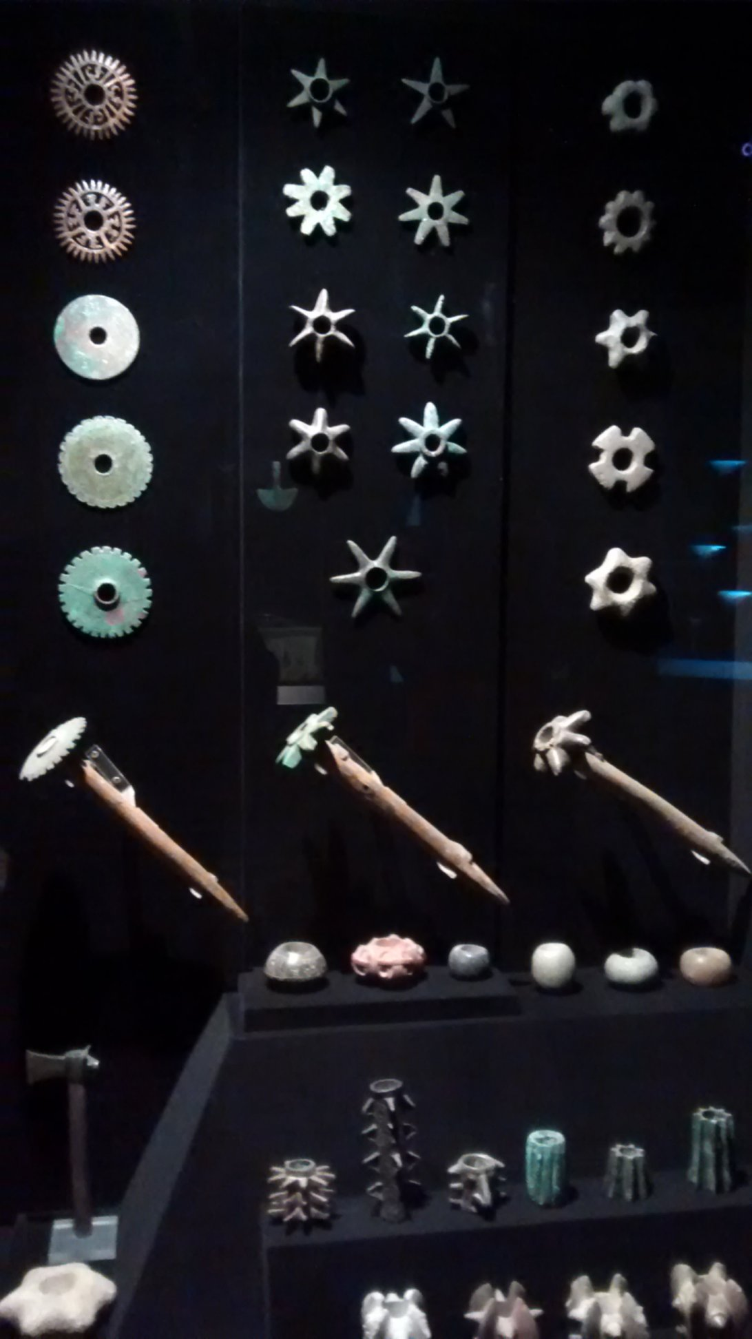 Tipos De Macana Inca